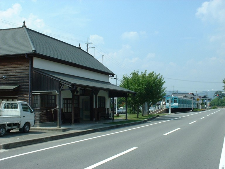 鍛冶屋線 市原駅跡 奥にキハ30の2連が静態保存されている 兵庫県西脇市市原町